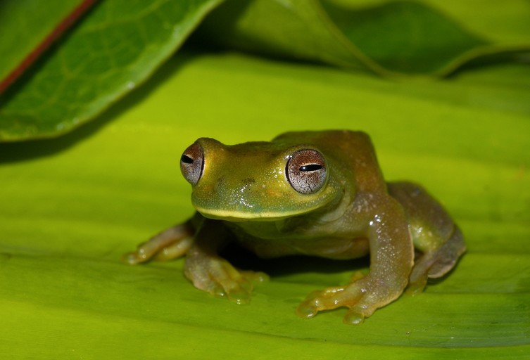 Hyloscirtus palmeri